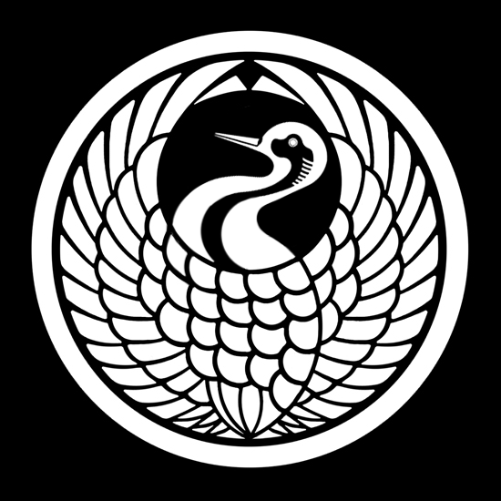 「丸に舞鶴」紋（染抜）